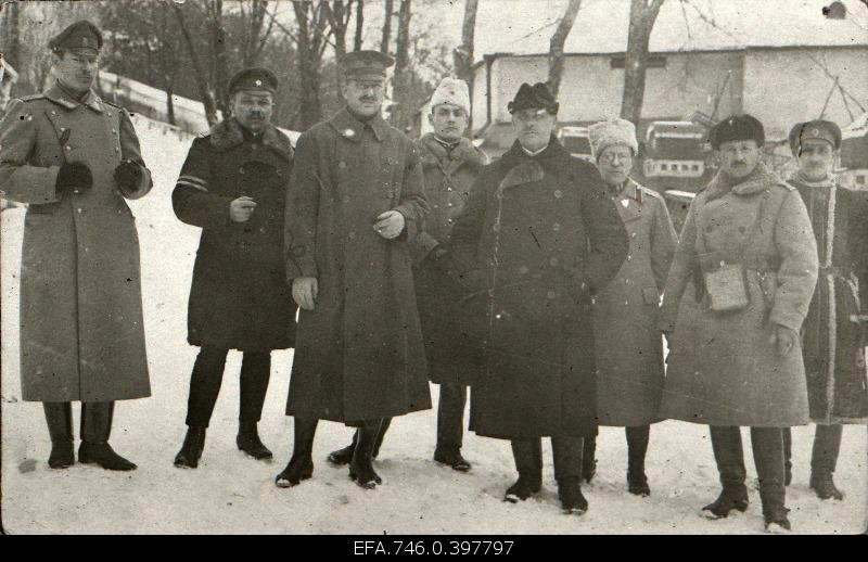 Vabadussõda. Ameerika Ühendriikide sõjaväeline esindaja Petseris.Vasakult: 1. Sõjavägede ülemjuhataja staabi käsundusohvitser kapten Eduard Villmann, 2. Kindralstaabi Valitsuse ülem polkovnik Jaan Rink, 3. Ameerika Ühendriikide sõjaväeline esindaja kapten August Krantz, 4. Soome Põhja Poegade Rügemendi ülem polkovnik Hans Kalm, 5. Välisministeeriumi sekretär Hermann Hellat, 6. tõlk, 7. 2.Jalaväepolgu ülem alampolkovnik Hans Kurvits, 8. 2.Jalaväepolgu 1.pataljoni ülem kapten Johannes Anderson.